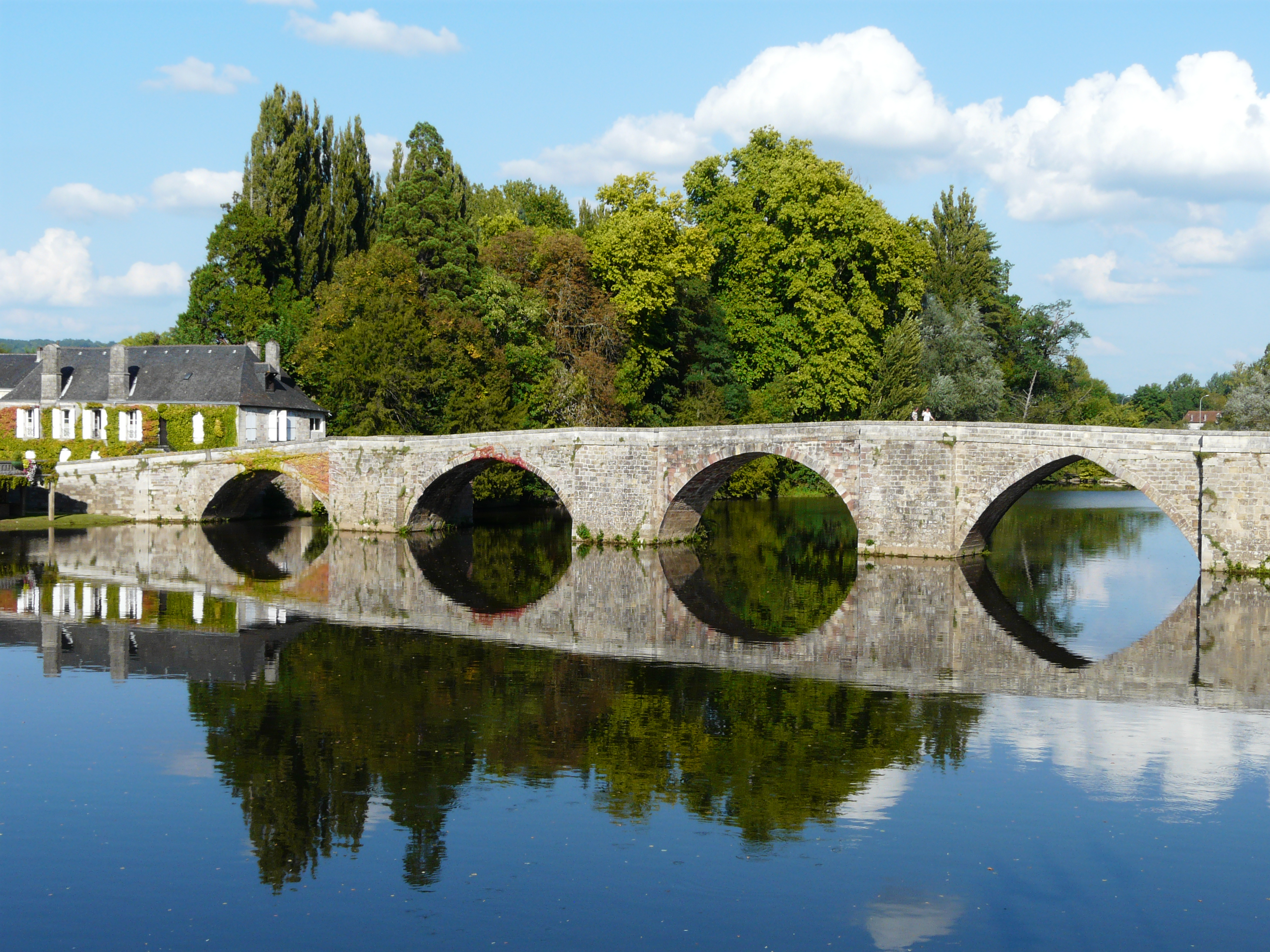 La partie aval du vieux pont de Terrasson sur la Vézère, Terrasson-Lavilledieu, Dordogne, France. .